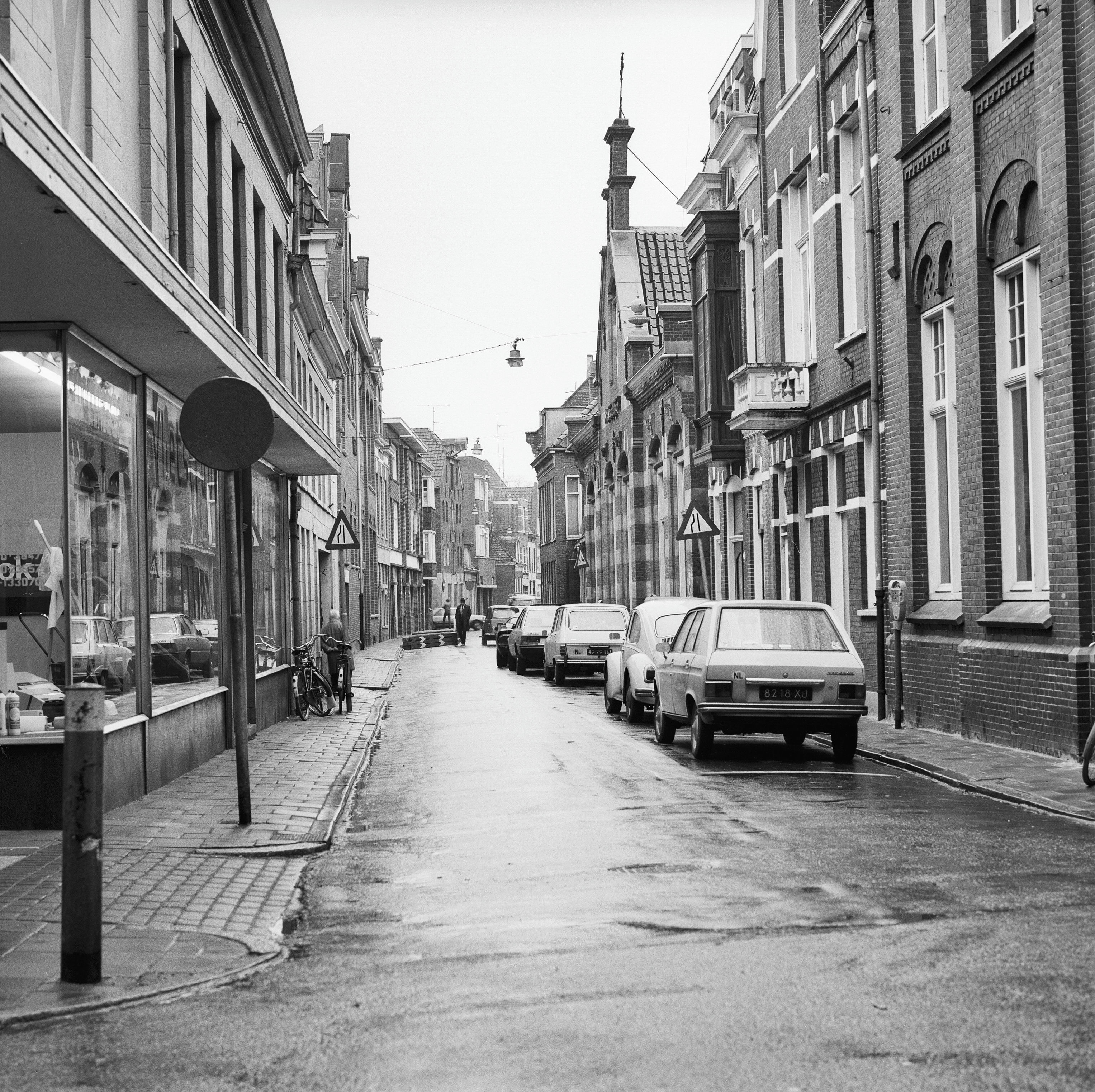 De Schoolholm in Groningen, gezien naar het zuiden